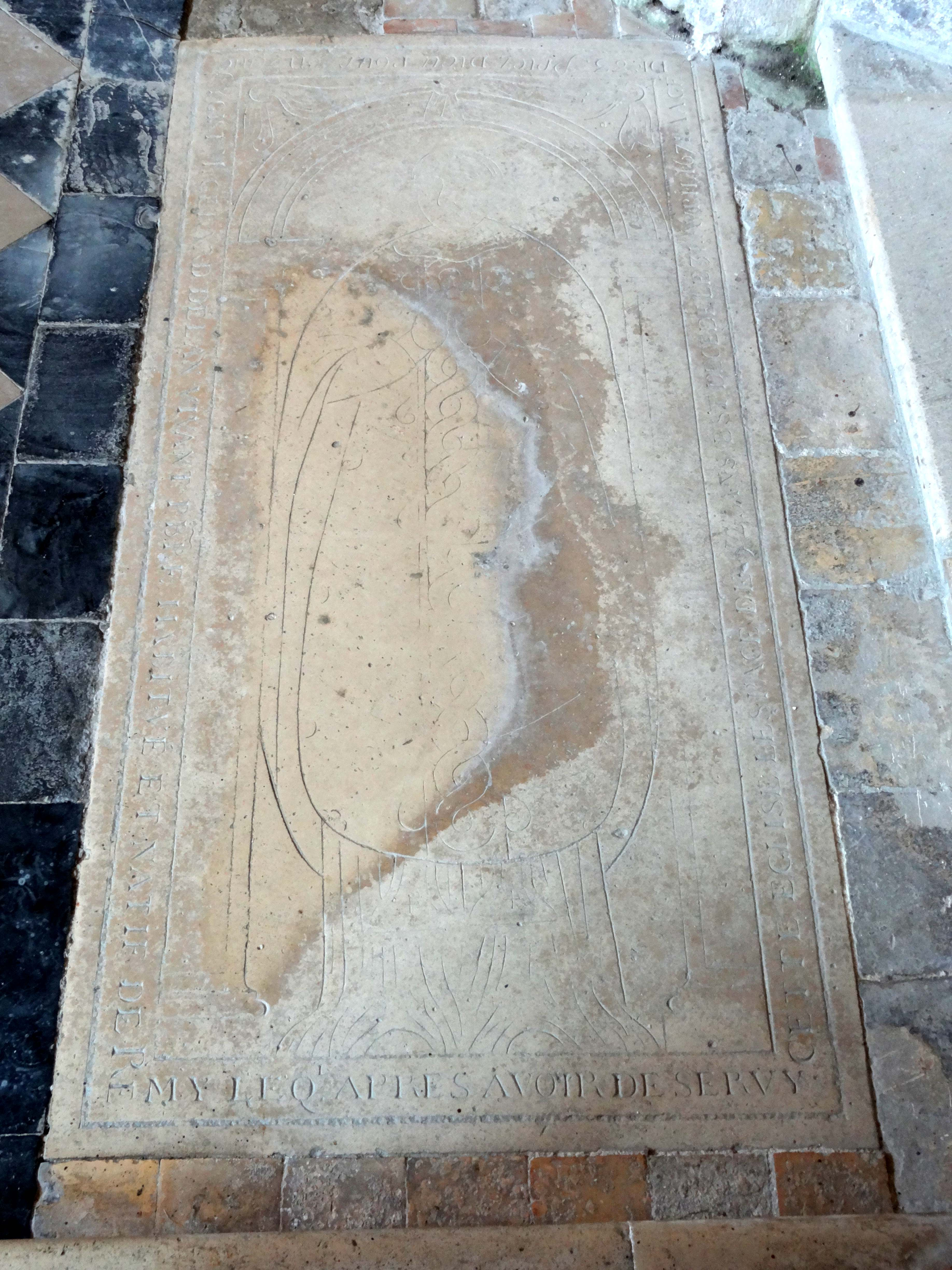 Mobilier de l'église - voir titre.